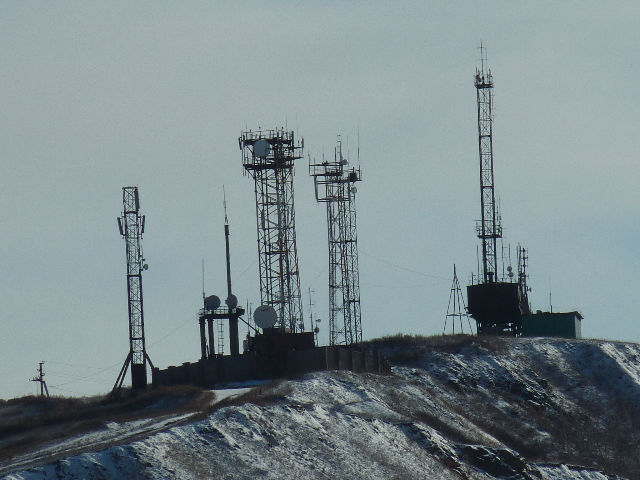 Антенны на вершине